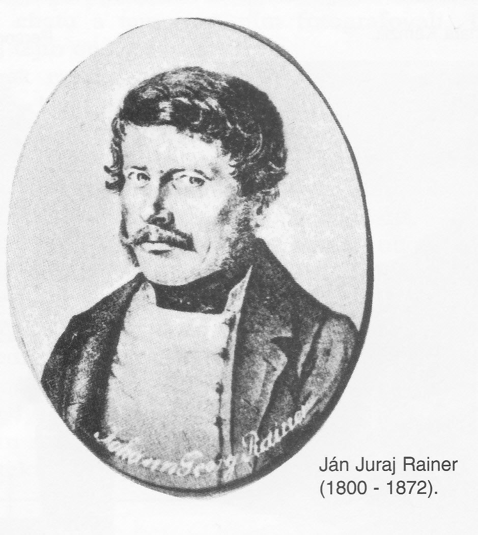 Juraj Rainer, nájomca Starého smokovca, Vysoké Tatry